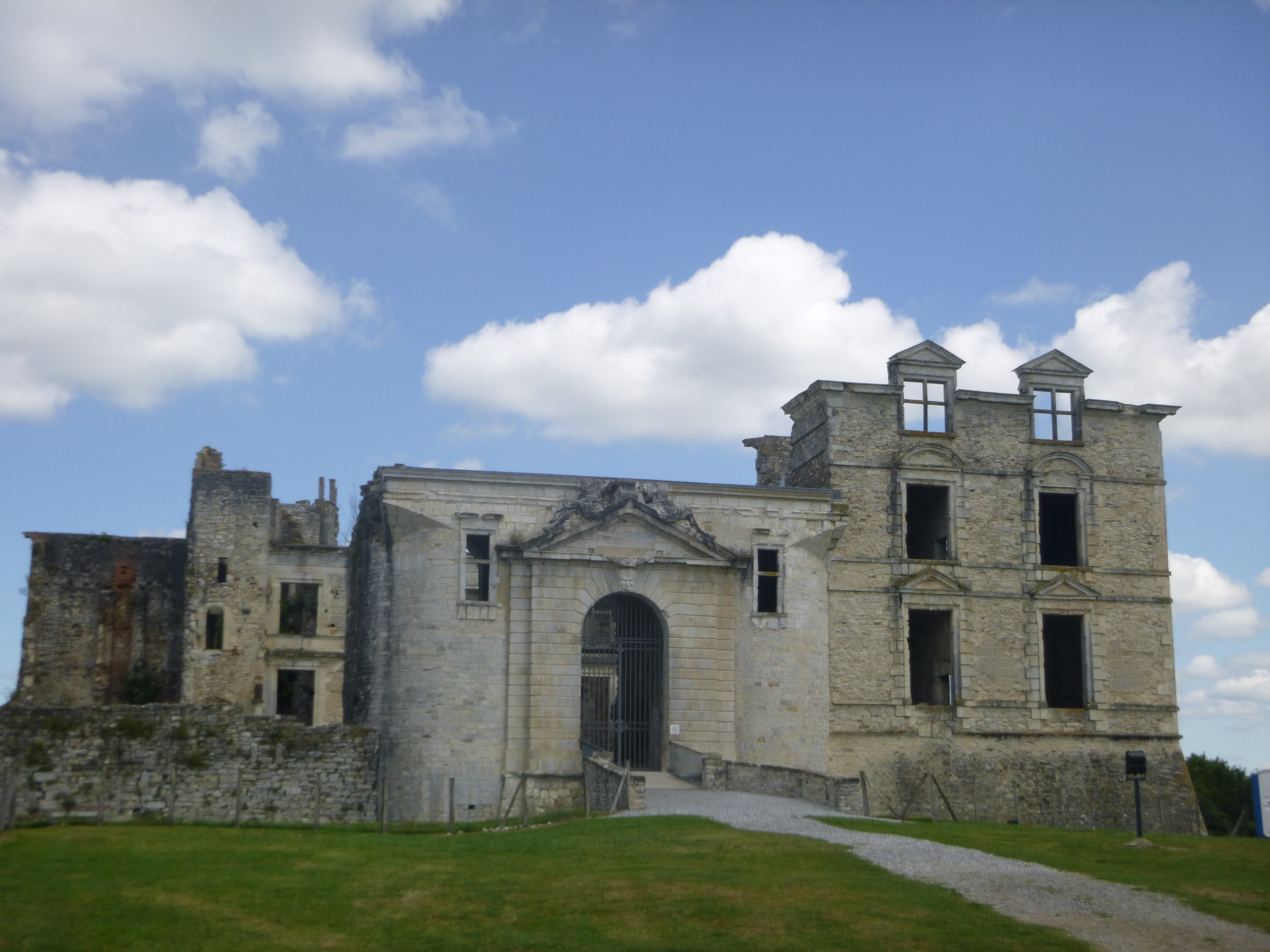 Chateau de Bidache